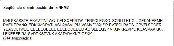 NPM2 seq